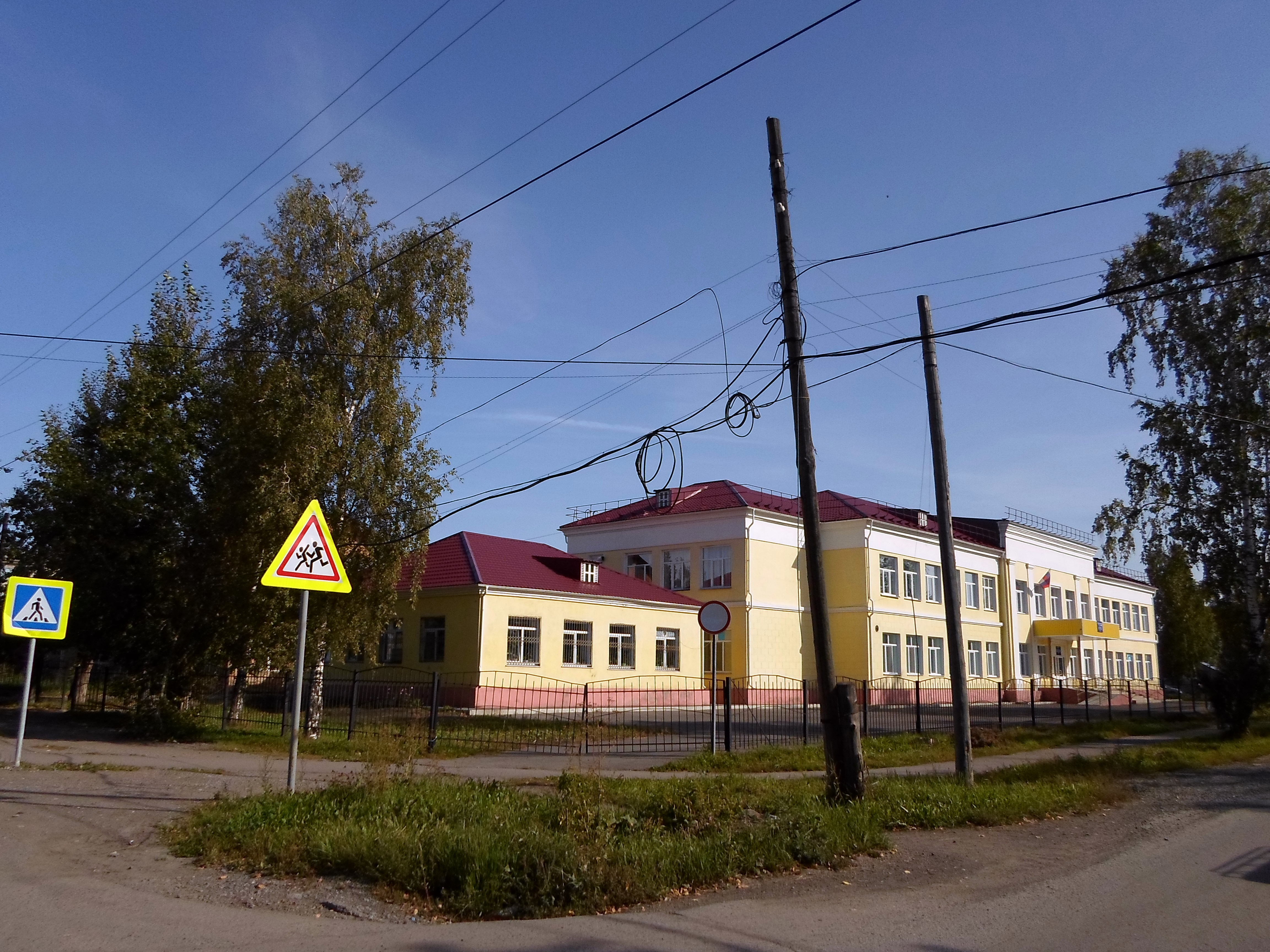 Средняя школа № 4 города Боготол. Красноярский край.